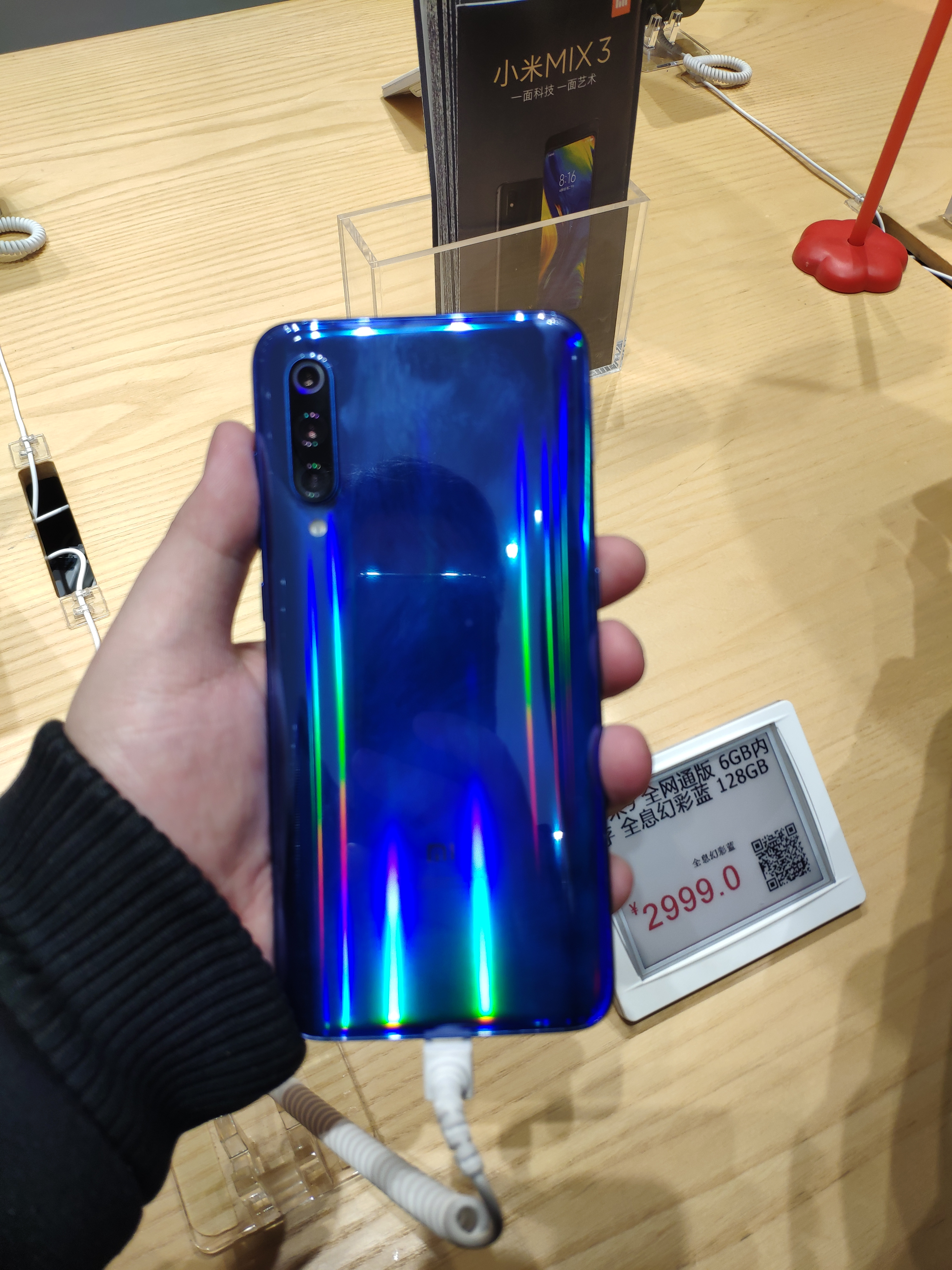 小米9（幻彩蓝色）的背面板，摄于某小米之家